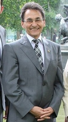 Montreal mayoral candidate Richard Bergeron.